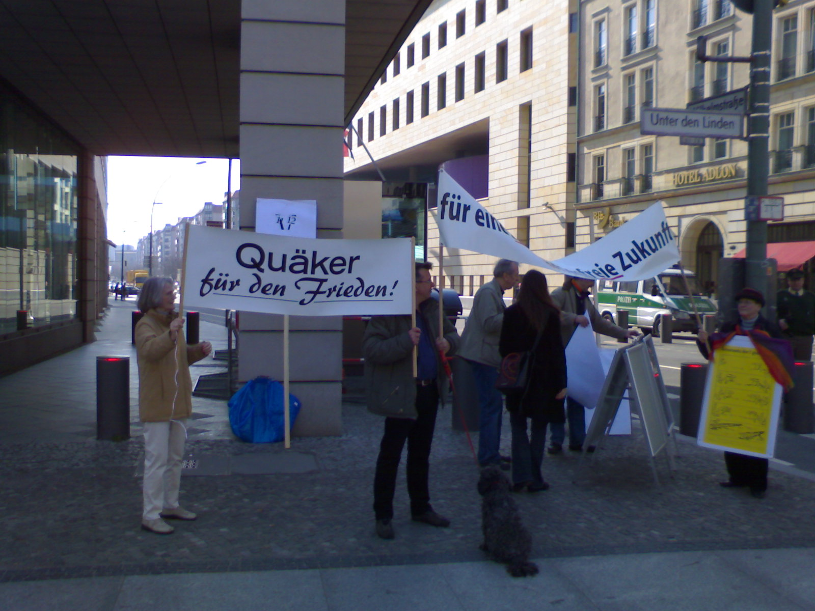 Einzelne Quäker bei der von ihnen organisierten "Mahnwache". Es sollte Solidarität mit den Quäker-Freunden in Schottland demonstriert werden, die zeitgleich dort den Eingang der Militärbasis blockierten, um gegen die atomare Wiederaufrüstung zu protestieren. Die internationale Aktion nannte sich "faslane365", an denen zahlreiche pazifistische Organisationen teilnahmen. Die Mahnwache hier auf dem Bild fand aber vor der Botschaft von Großbritannien in Berlin "unter den Linden" statt. Teilnehmerzahl: ca. 30 Pazifisten und ein Polizist.